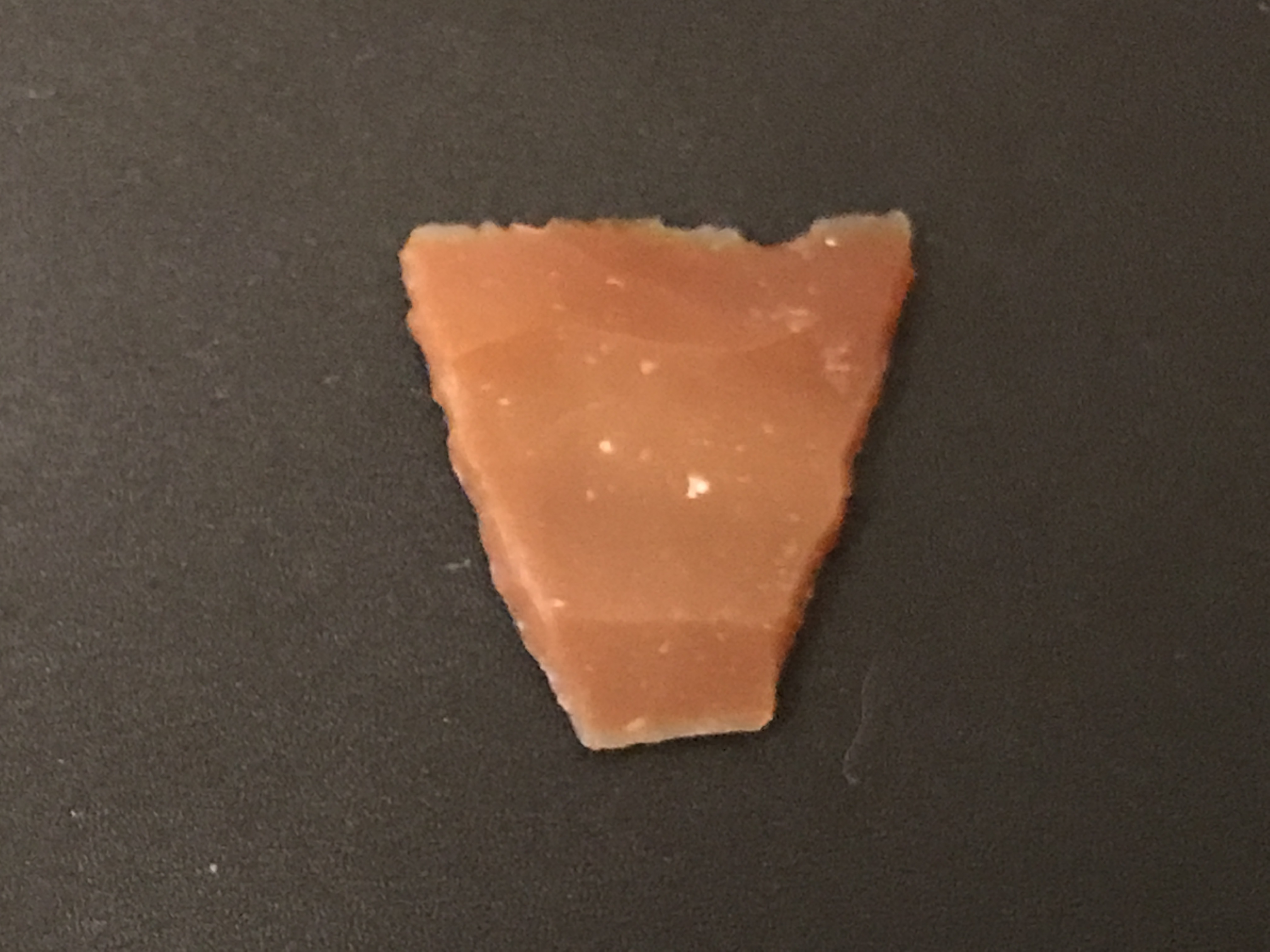 Querschneider 1